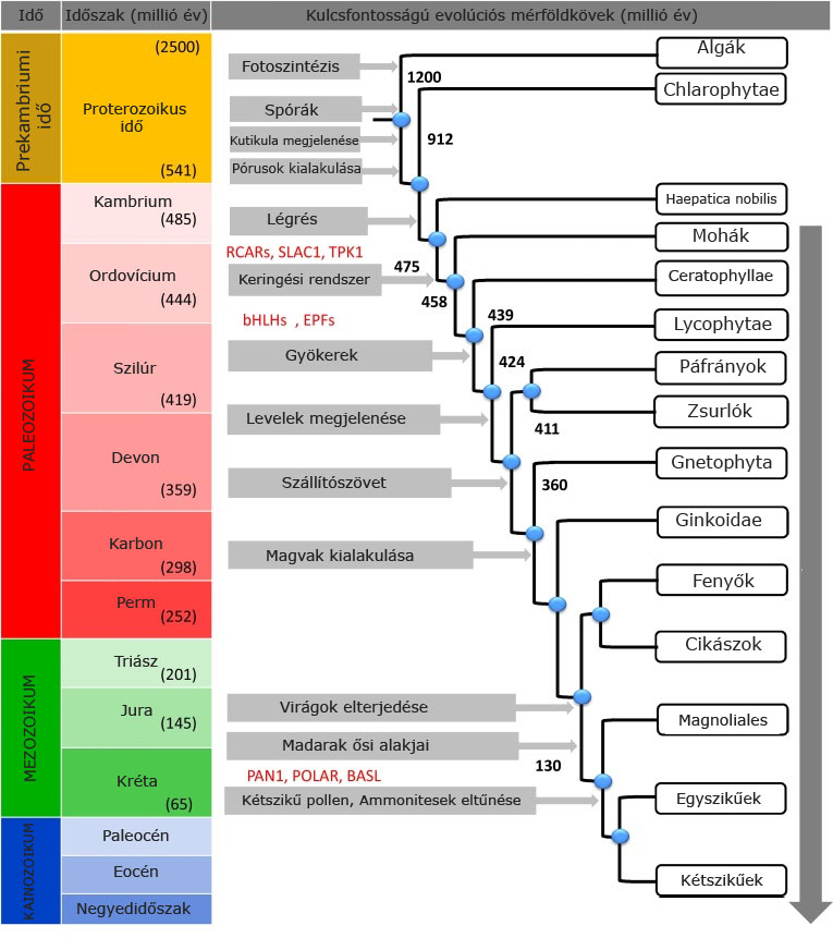 Mol. ev.